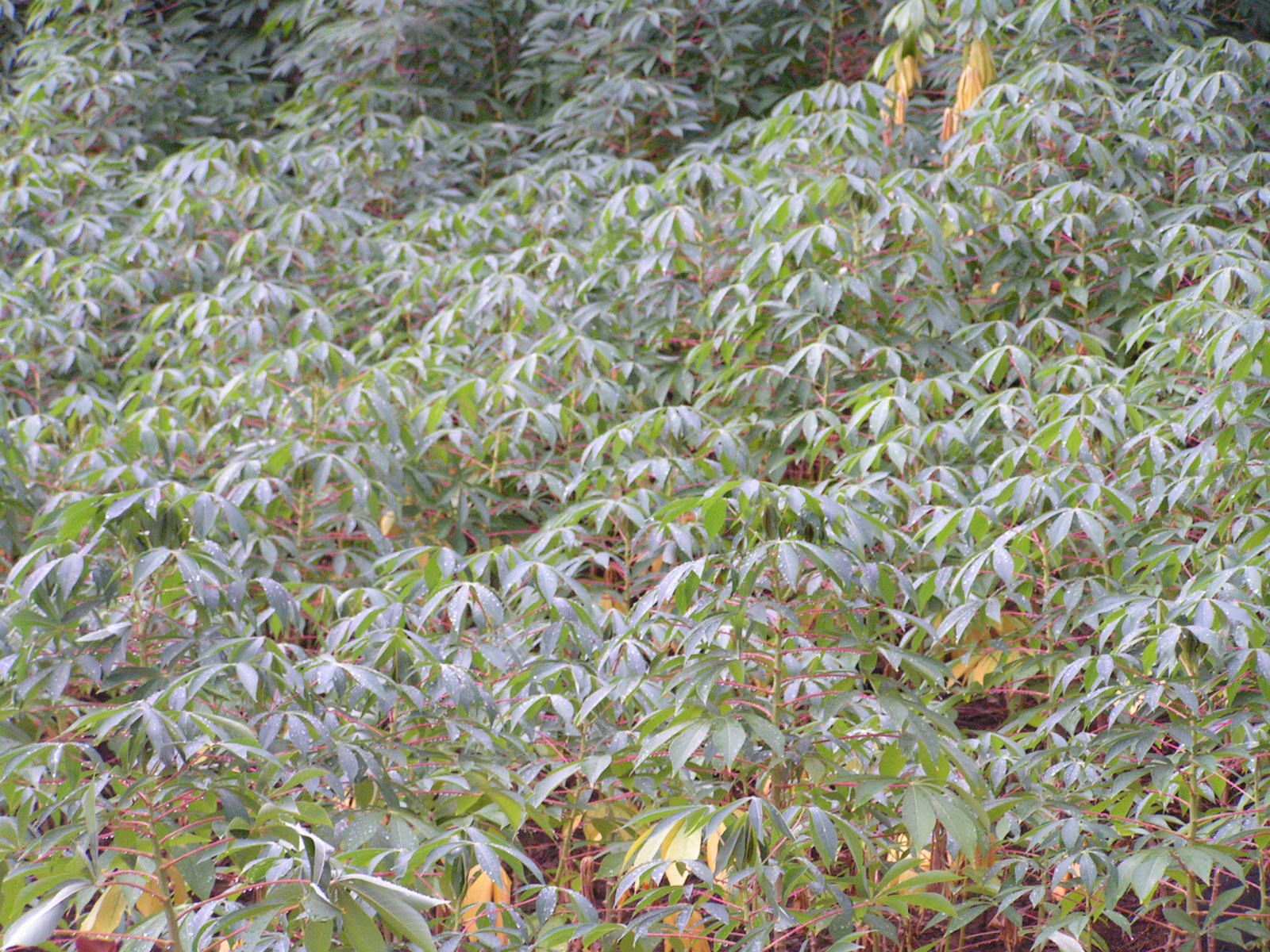 balanghoy (cassava) in Ubay, Bohol